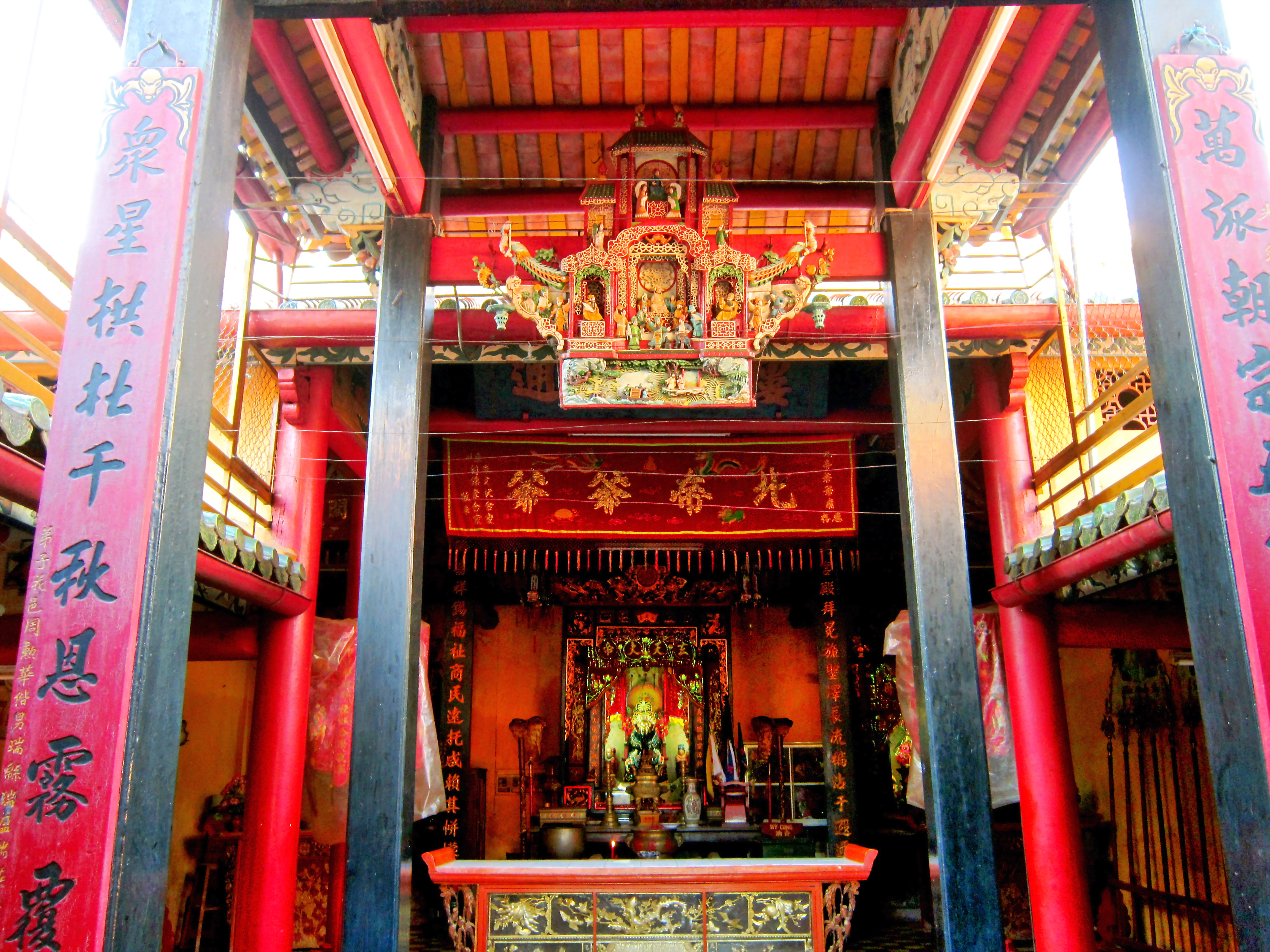 Nội thất chùa Ông Bắc ở thành phố Long Xuyên (An Giang, Việt Nam)